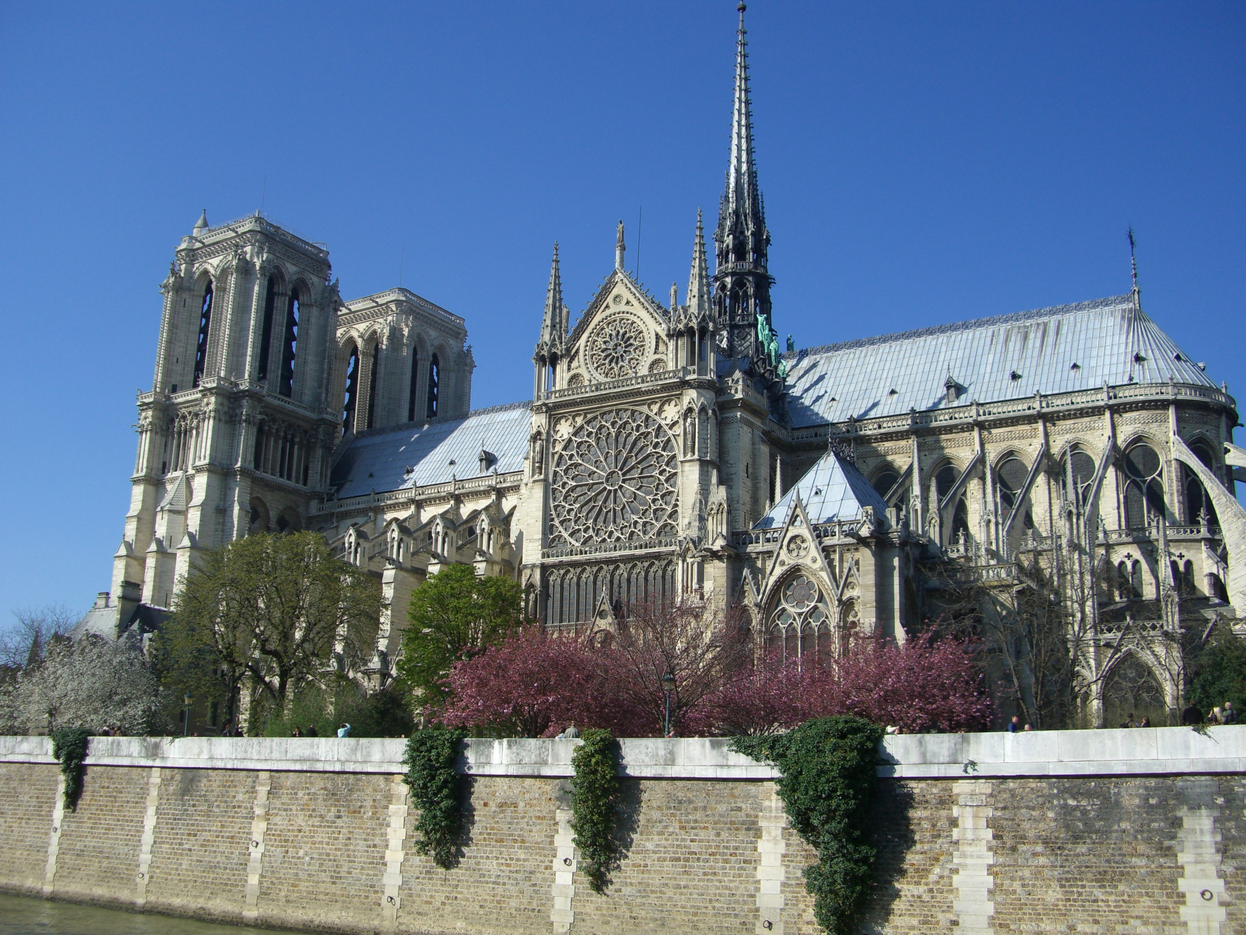 Notre-Dame de Paris vista do Sena (WikiEncontro da WP:PT em Paris)